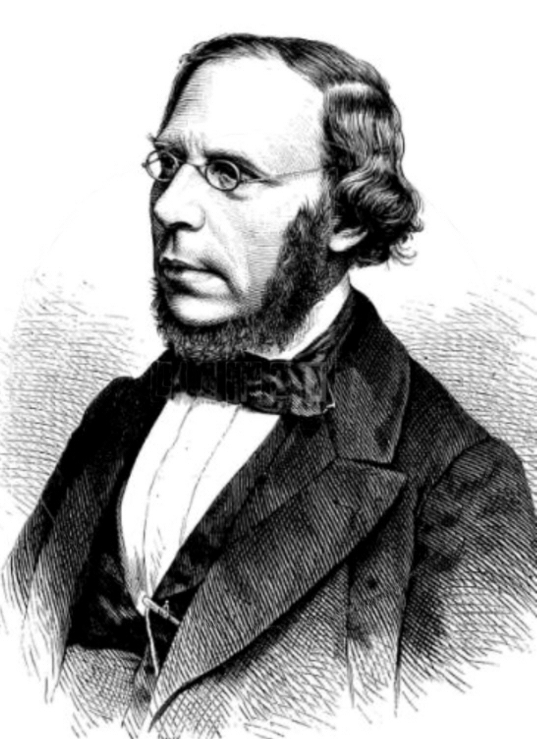 Carl Alexander Martius, (* 19. Januar 1838 in München; † 26. Februar 1920 in Nonn bei Bad Reichenhall)